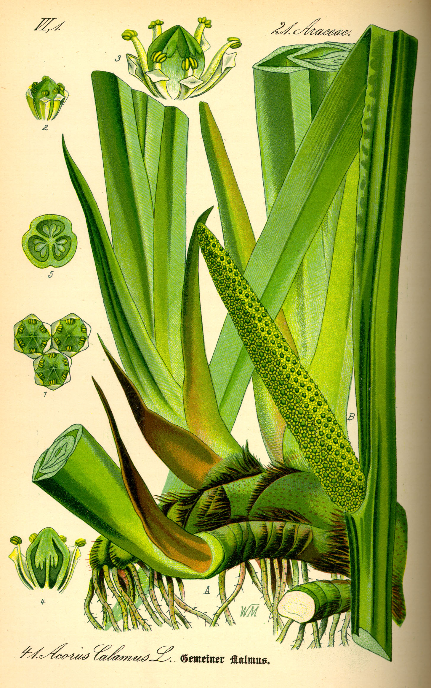 Name Acorus calamus Family Acoraceae Original book source: Prof. Dr. Otto Wilhelm Thomé Flora von Deutschland, Österreich und der Schweiz 1885, Gera, Germany